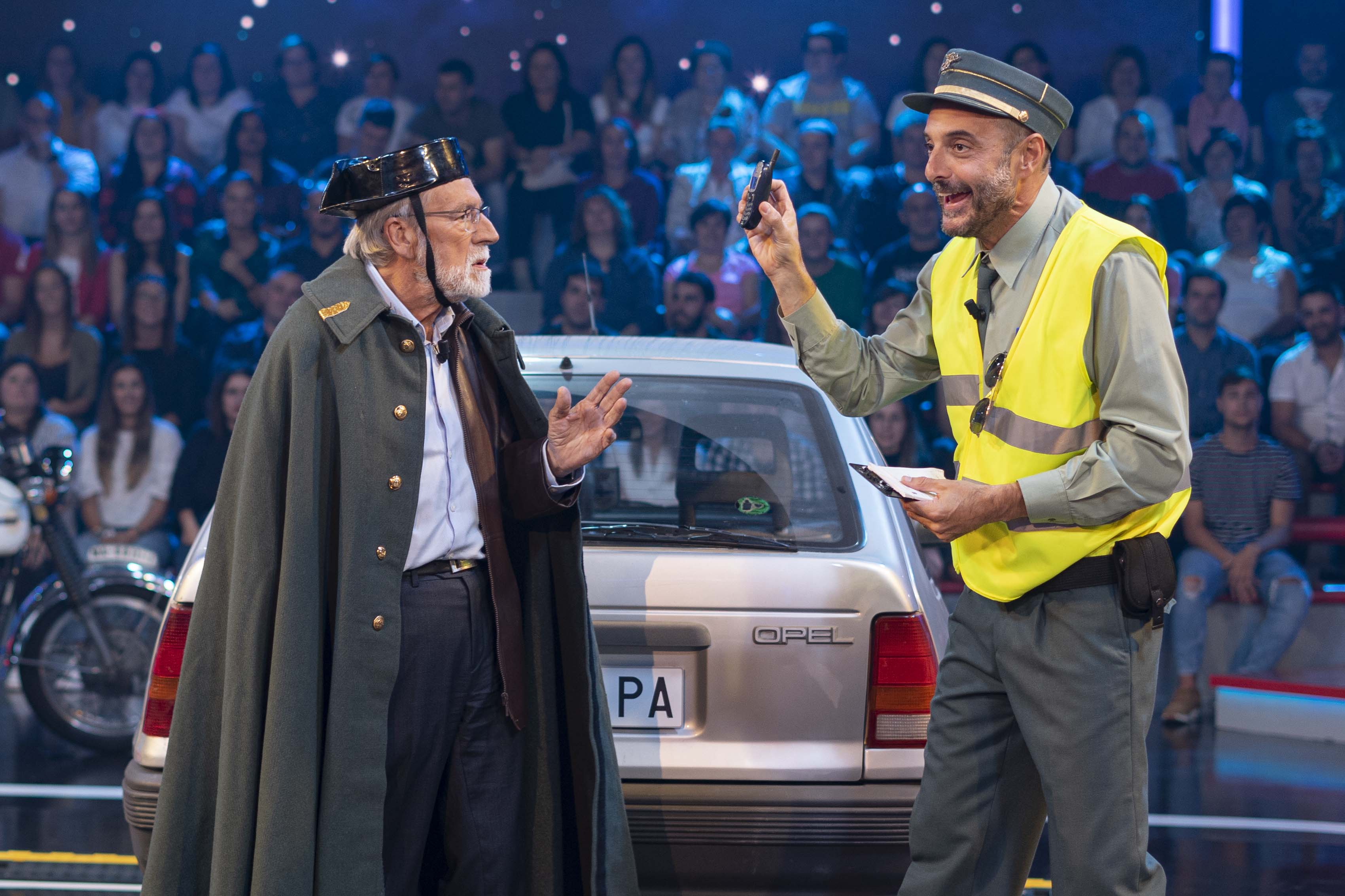 Farruco caracterizado do cabo Mosteiro no programa Land Rober Tunai Show